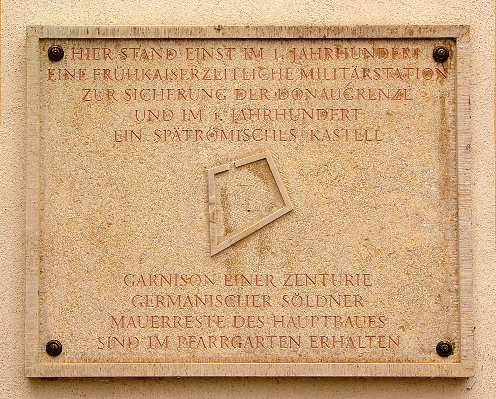 Hinweistafel zum römischen Kastell in der Amalienstraße 27 in Neuburg an der Donau